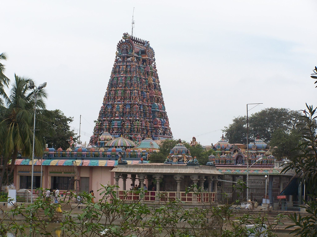 Pillayarpatti Temple